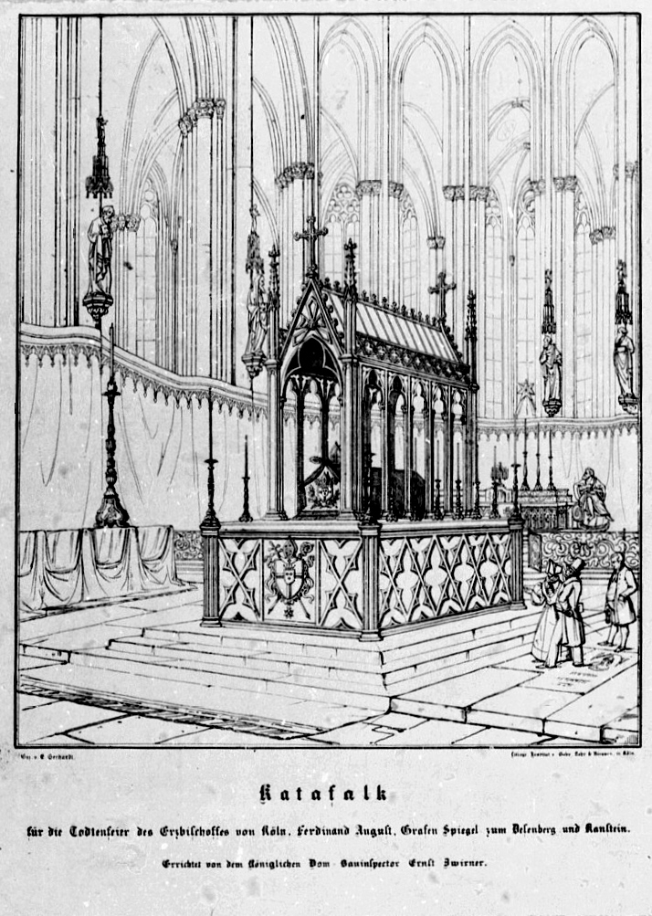 Katafalk für die Totenfeier für den Erzbischof Ferdinand August Spiegel († 1835), errichtet von dem kgl. Dombauinspektor Ernst Zwirner. Lithographie nach Eduiard Gerhardt.